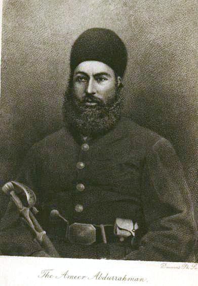 Abdur Rahman Khan